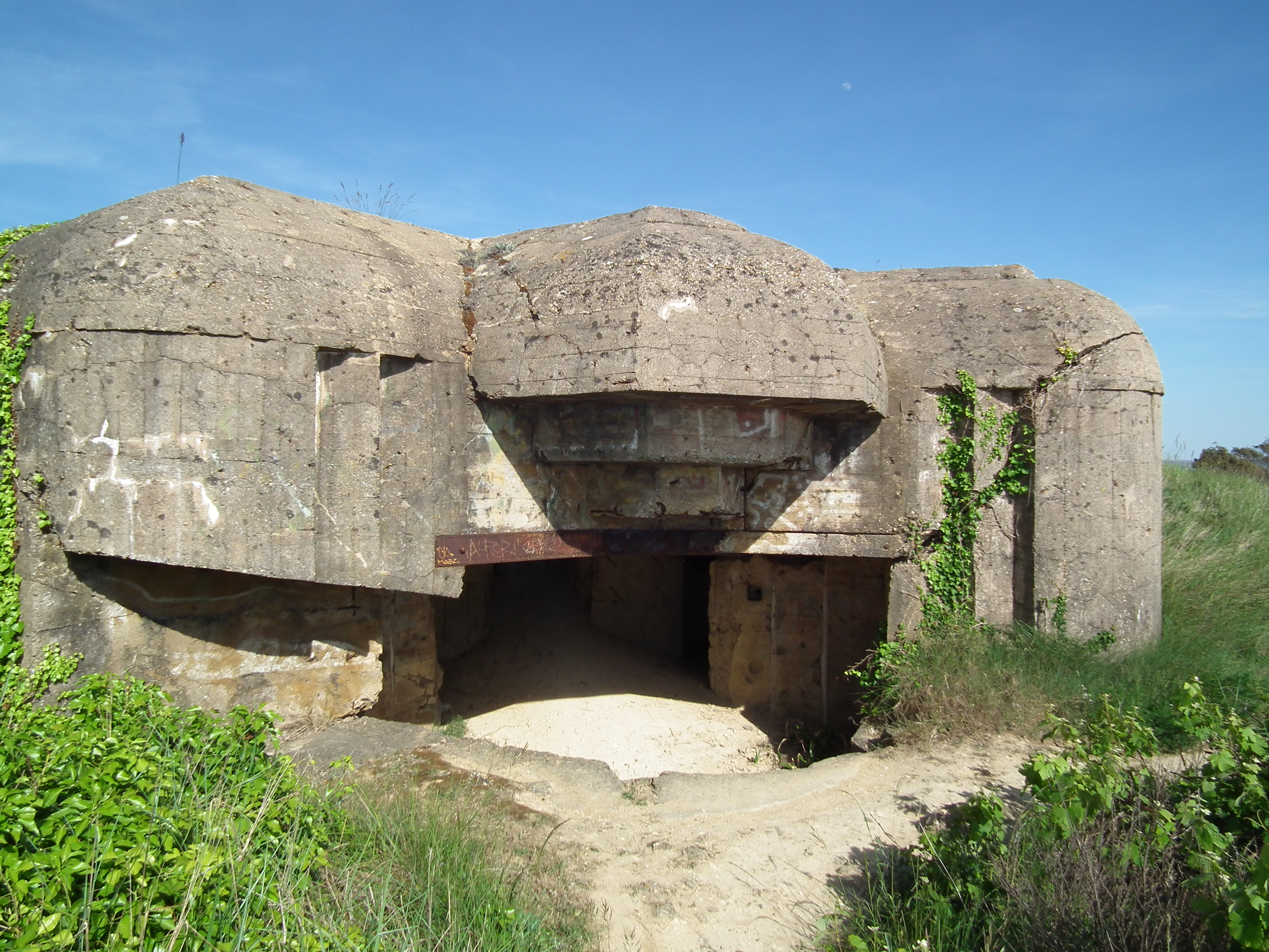 Vestiges du Mur de l'Atlantique à la pointe de Suzac. L'ancien fort de Suzac était chargé de protéger la poche (allemande) de Royan.